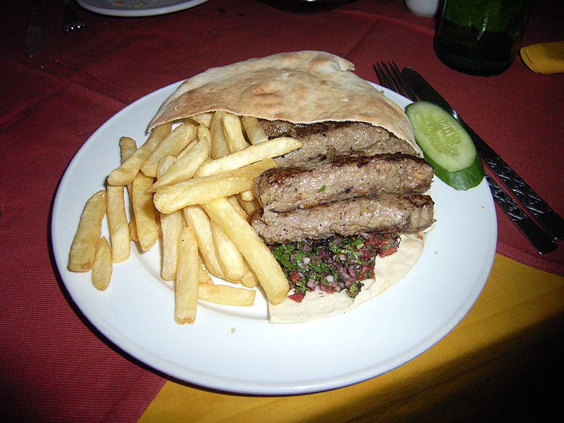 Kofta mit Pommes frites